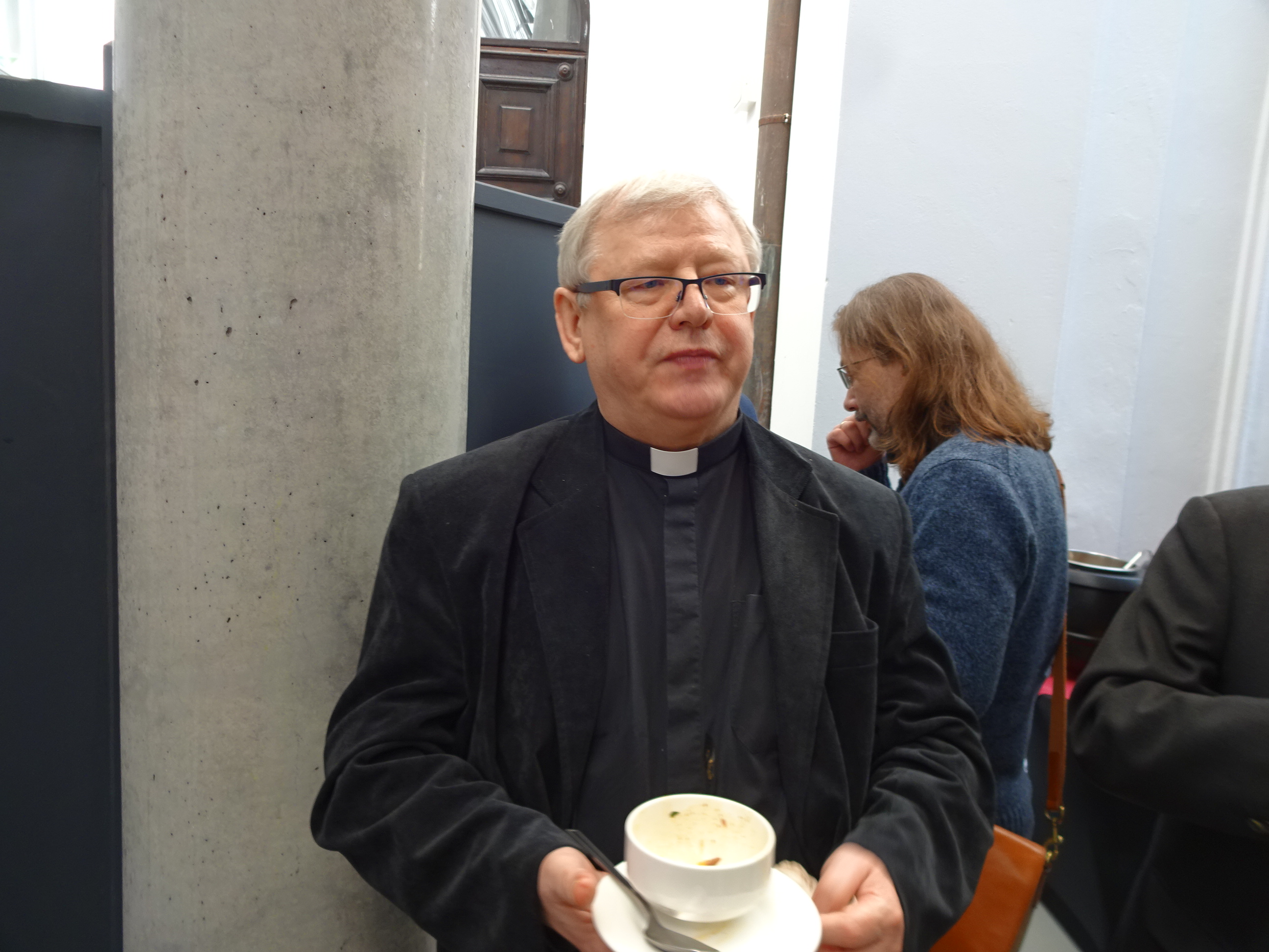 Zbigniew Kamiński Kredytowa 1 2018-03-17